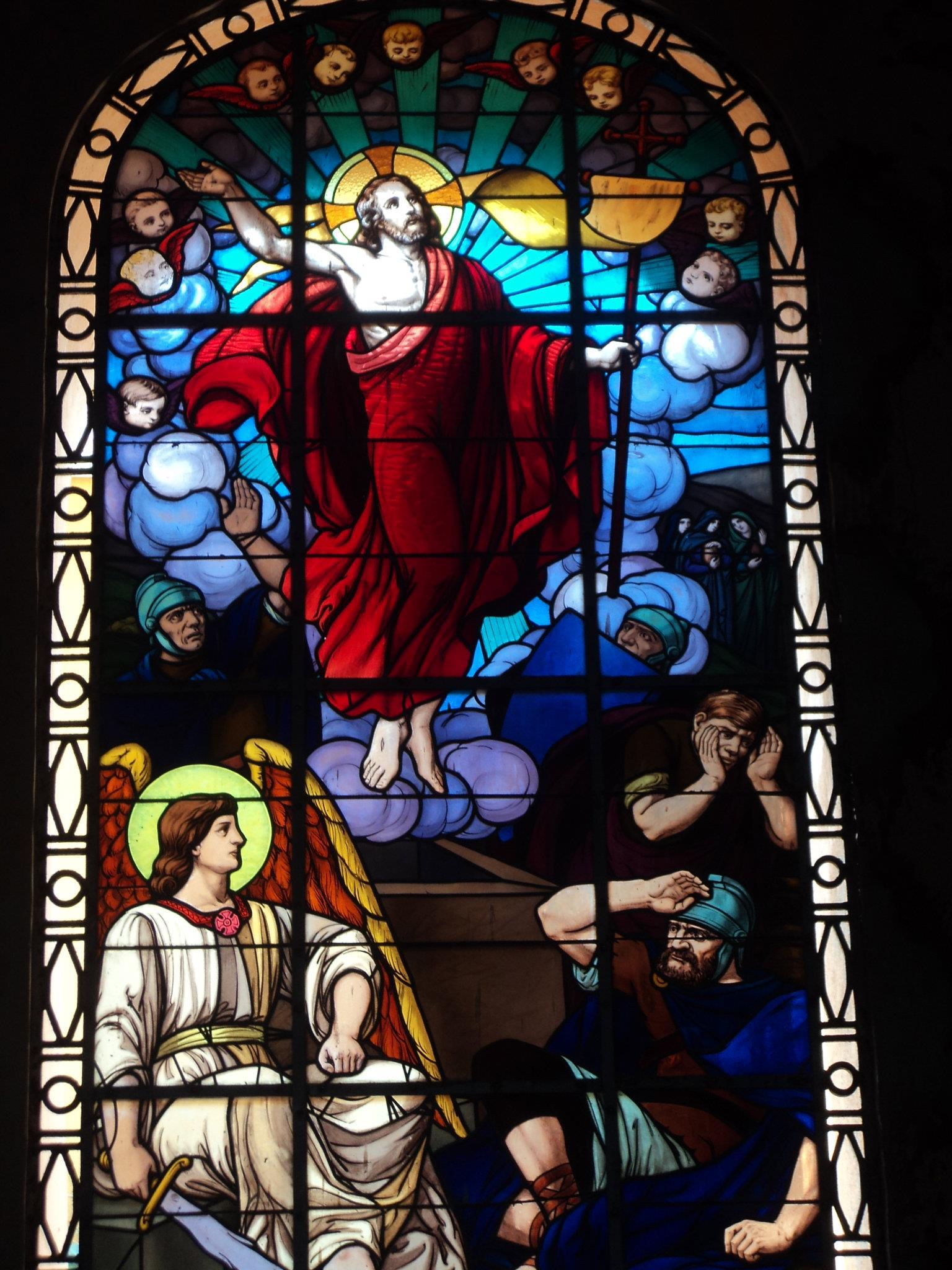 05-081 Ubicado en la nave lateral izquierda del templo, representa la ascensión de Jesús a los cielos tres días posteriores a su muerte en la cruz